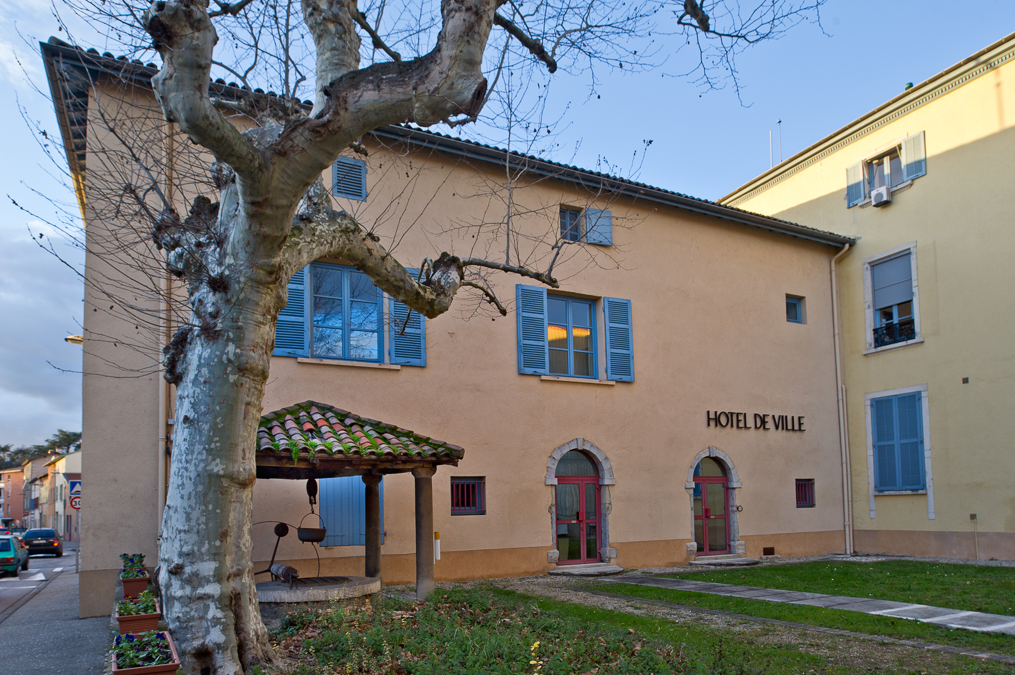 Maison de Mijolla, 28 Rue du Général-de-Gaulle (Inscrit, 1980)